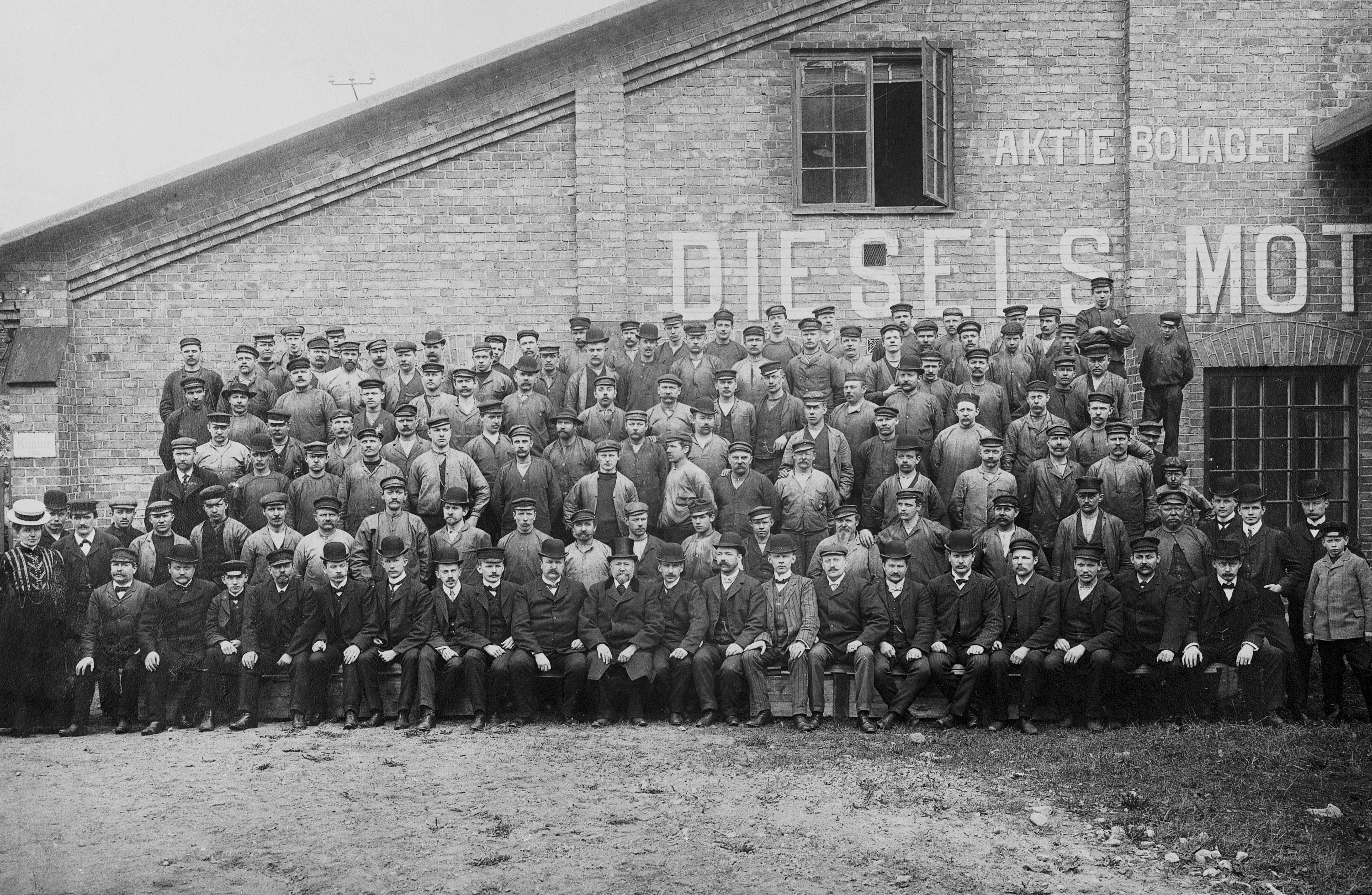 Arbetsstyrkan vid Diesels Motor i Sickla